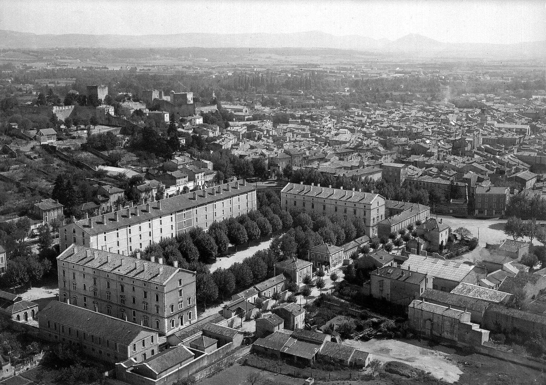 Facile distinction des droit bâtiments principaux toujours conservés